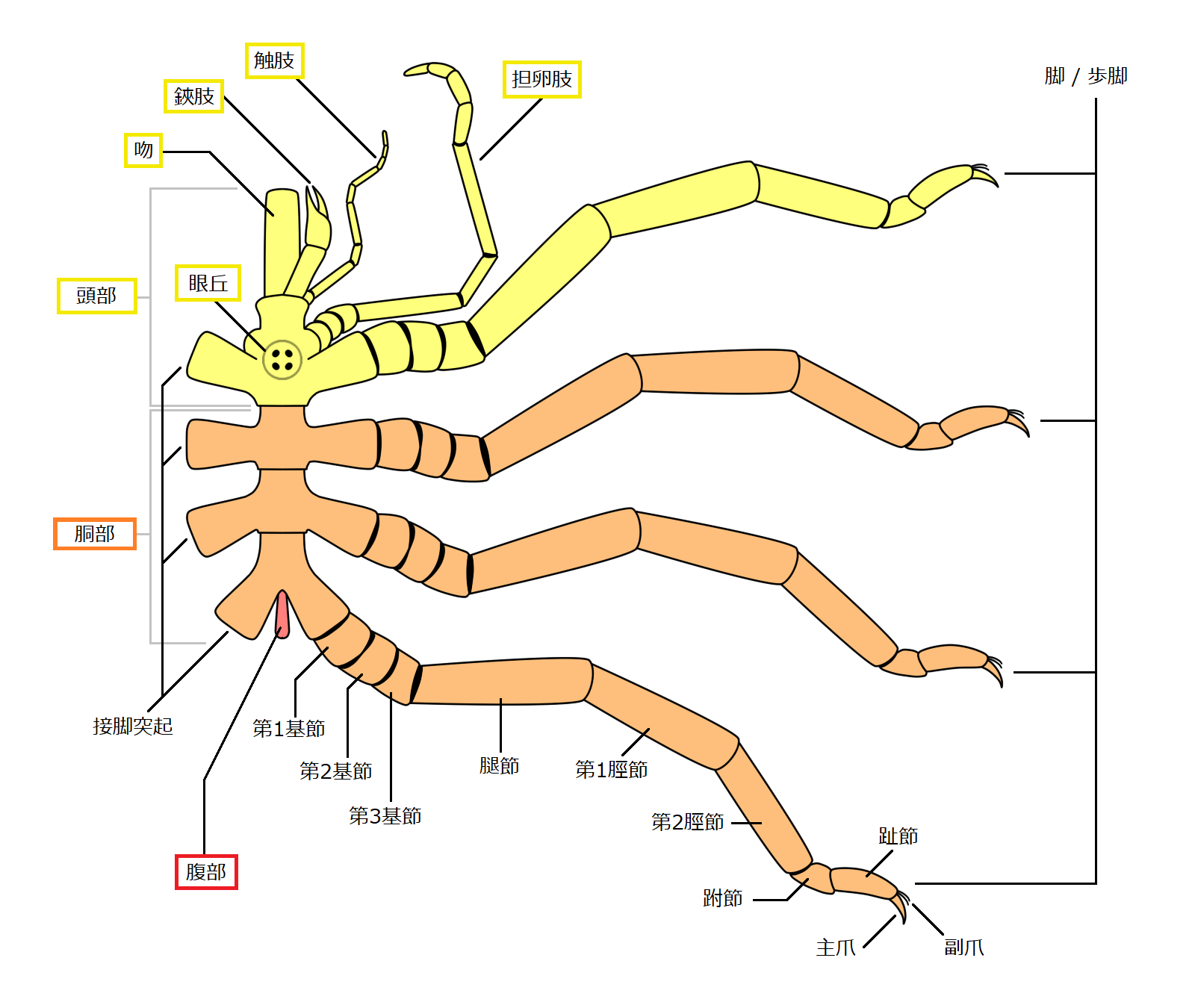 皆脚目 Pantopoda のウミグモ（鋏角類 Chelicerata・ウミグモ綱 Pycnogonida）の基本外部形態。左側の付属肢は省略される。 English